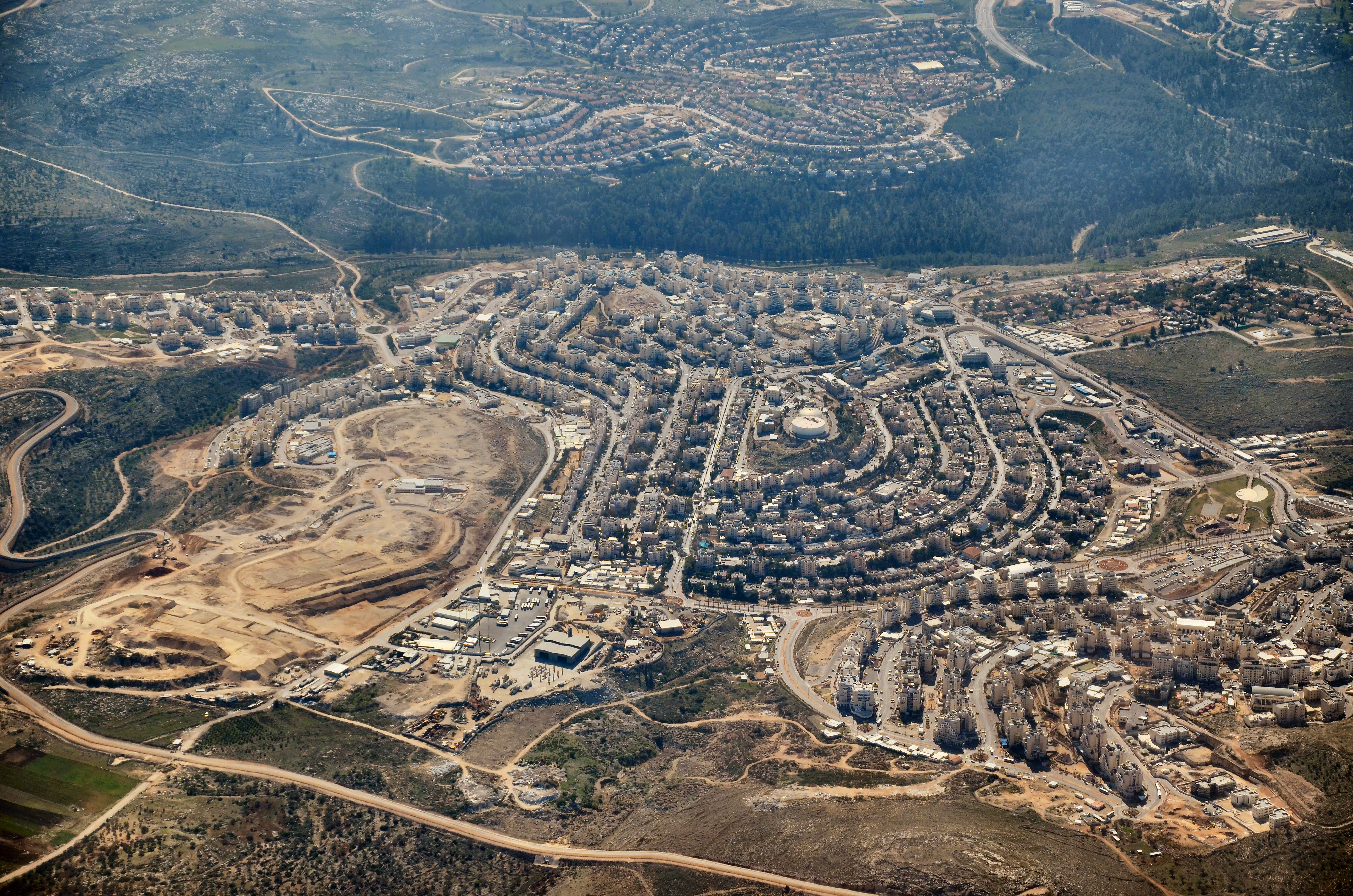 קרית ספר (מודיעין עילית) . בפינה הימנית למטה נראית שכונת ברכפלד. במרכז התמונה נראית שכונת קרית ספר, ובשליש השמאלי ניתן לראות את חפציבה ומתחתיה נאות הפסגה.